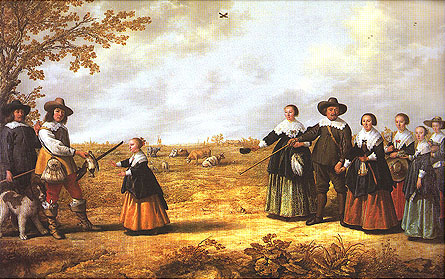 painting